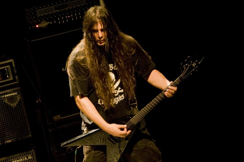 Pat O'Brien of Cannibal Corpse Live @ Santana Hall - 21/02/2010 - São Paulo, Brasil É proibida a cópia ou reprodução deste material sem a autorização do autor. Por favor, não publique nada daqui sem o devido crédito. Fotógrafo: Alexandre Cardoso